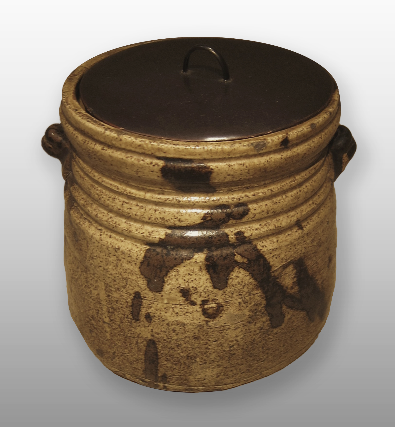 Japan; Water jar; Ceramics